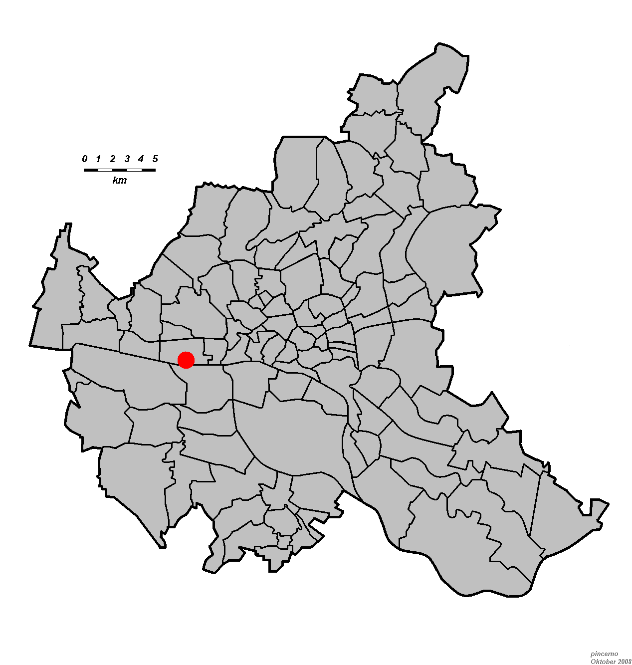 Standort des Findlings Alter Schwede in Hamburg.